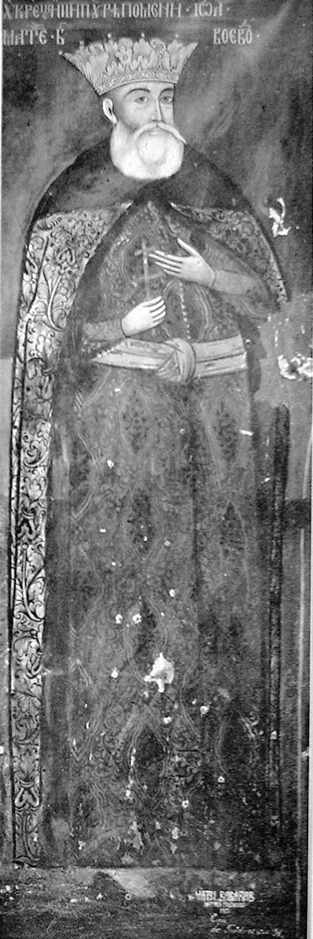 Matei Basarab, at Polovragi monastery